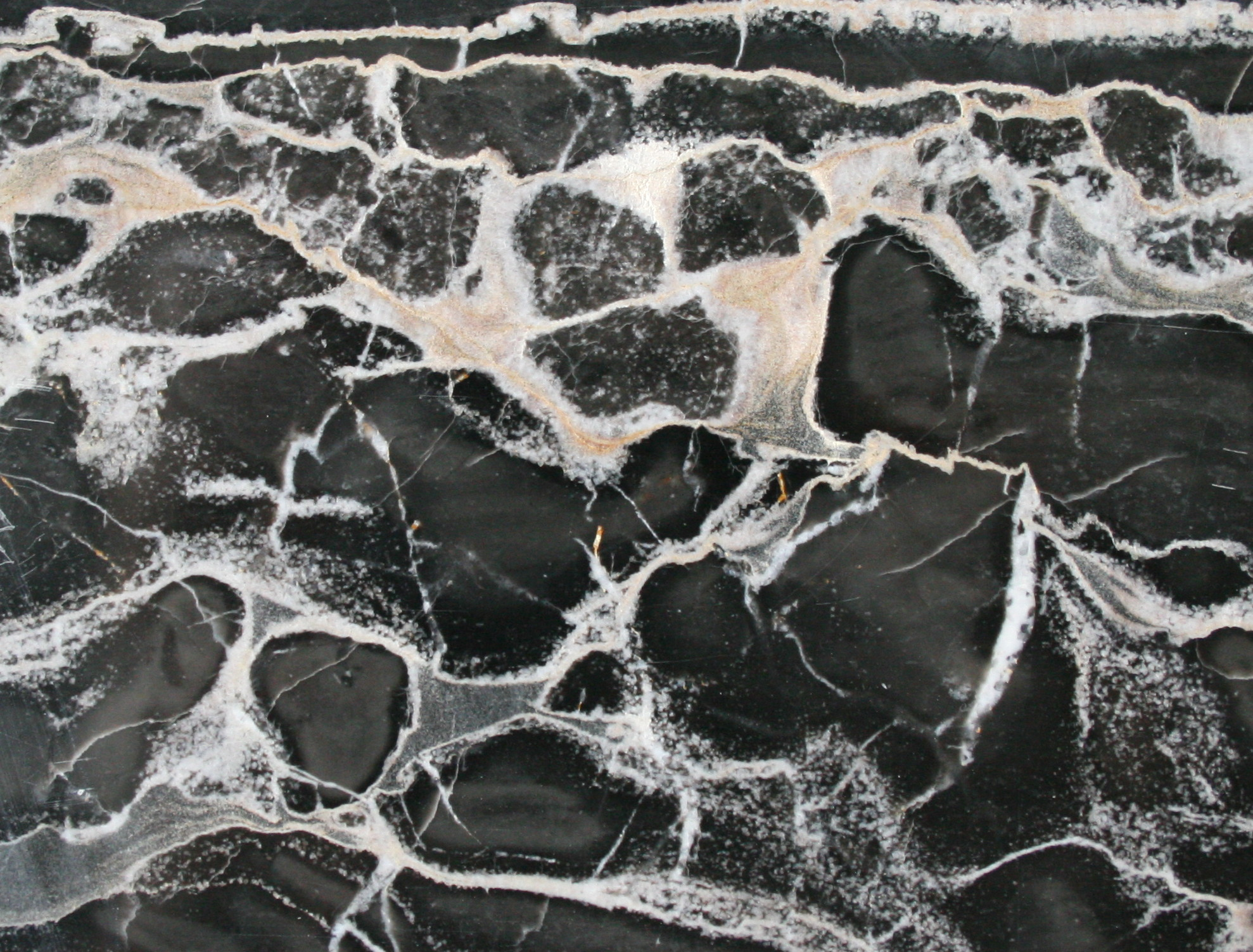 Nero Portoro. Kalkstein aus Italien